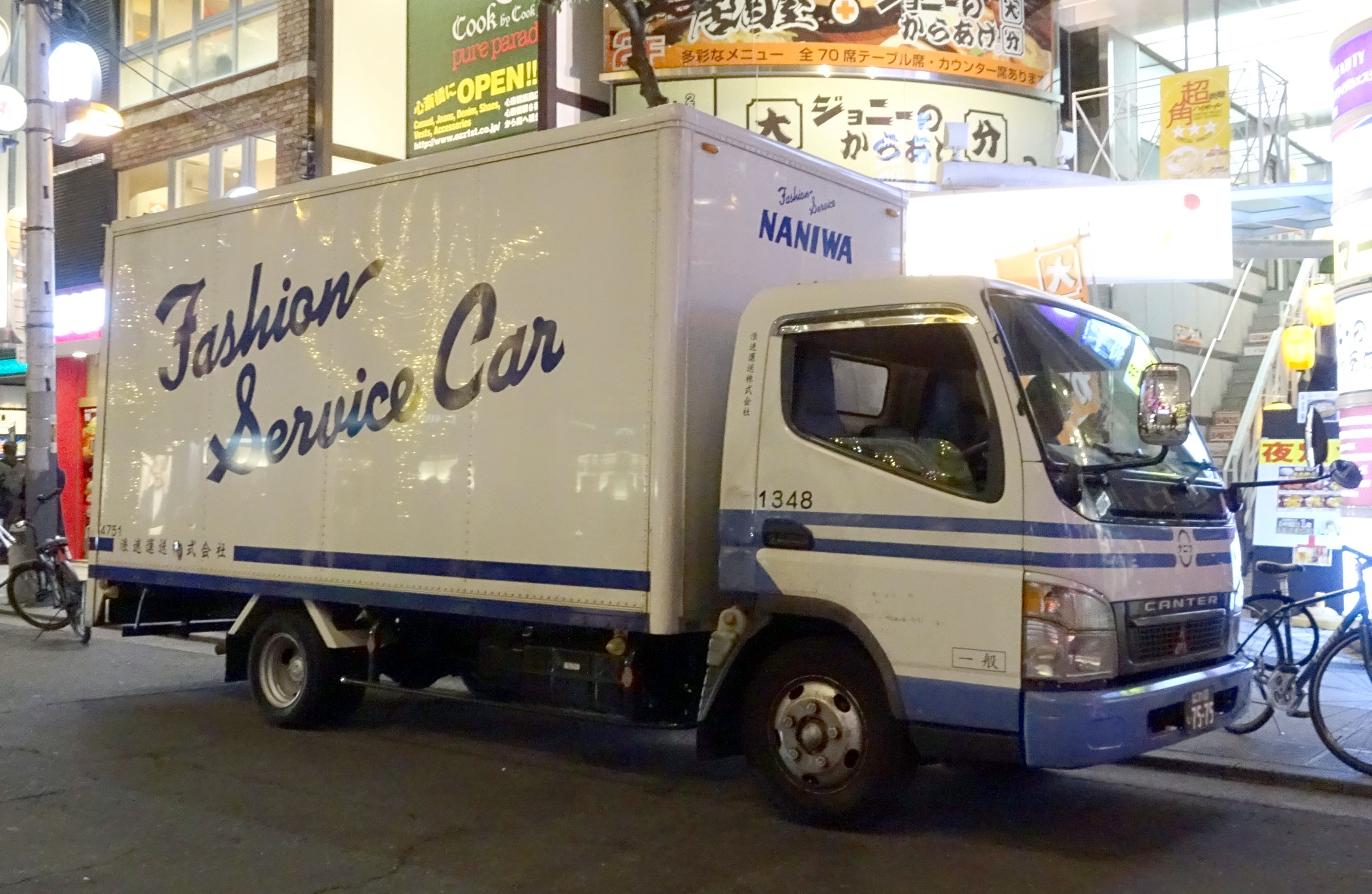 浪速運送株式会社のトラック。